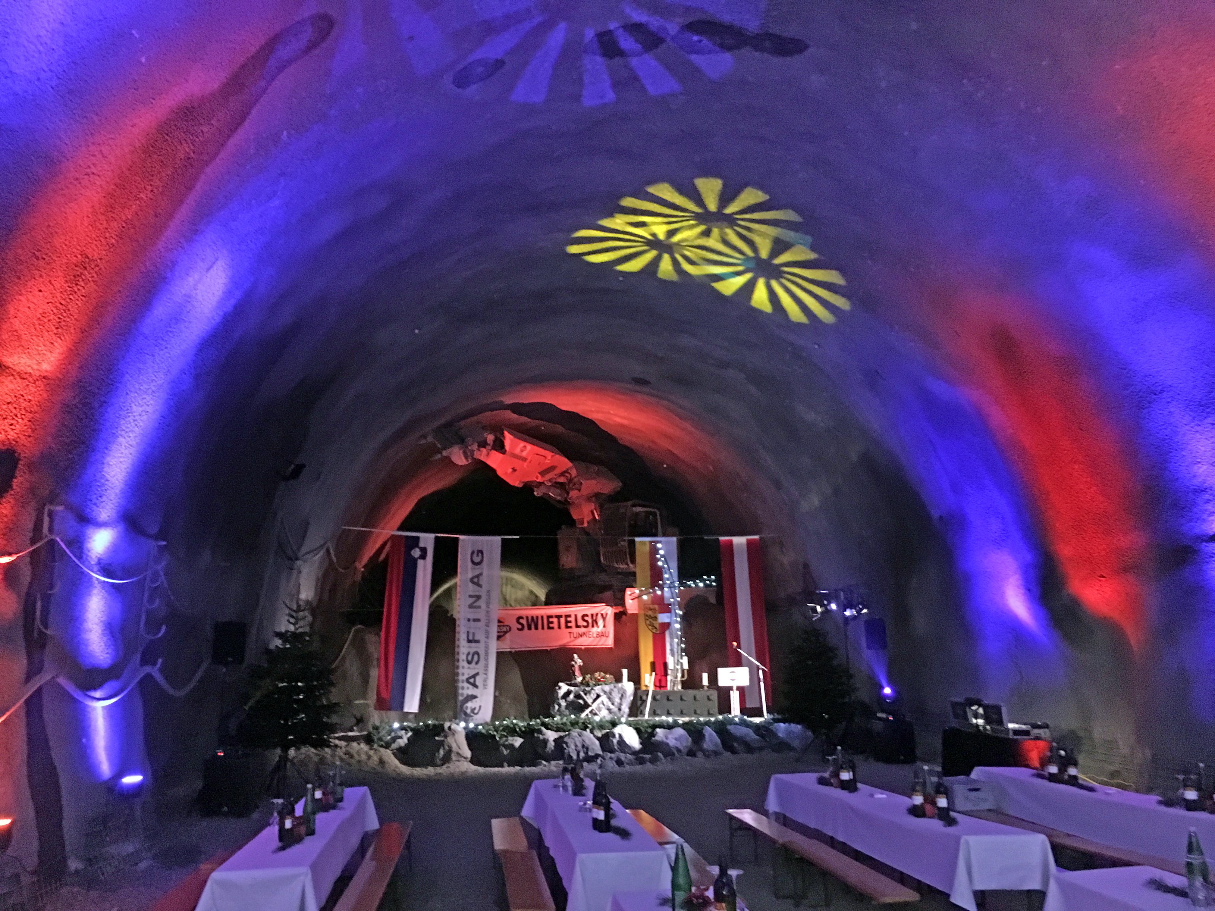 Barbarafeier der Fa. Swietelsky in der Oströhre des Karawanken-Straßentunnels, Österreich, 4. Dez '18